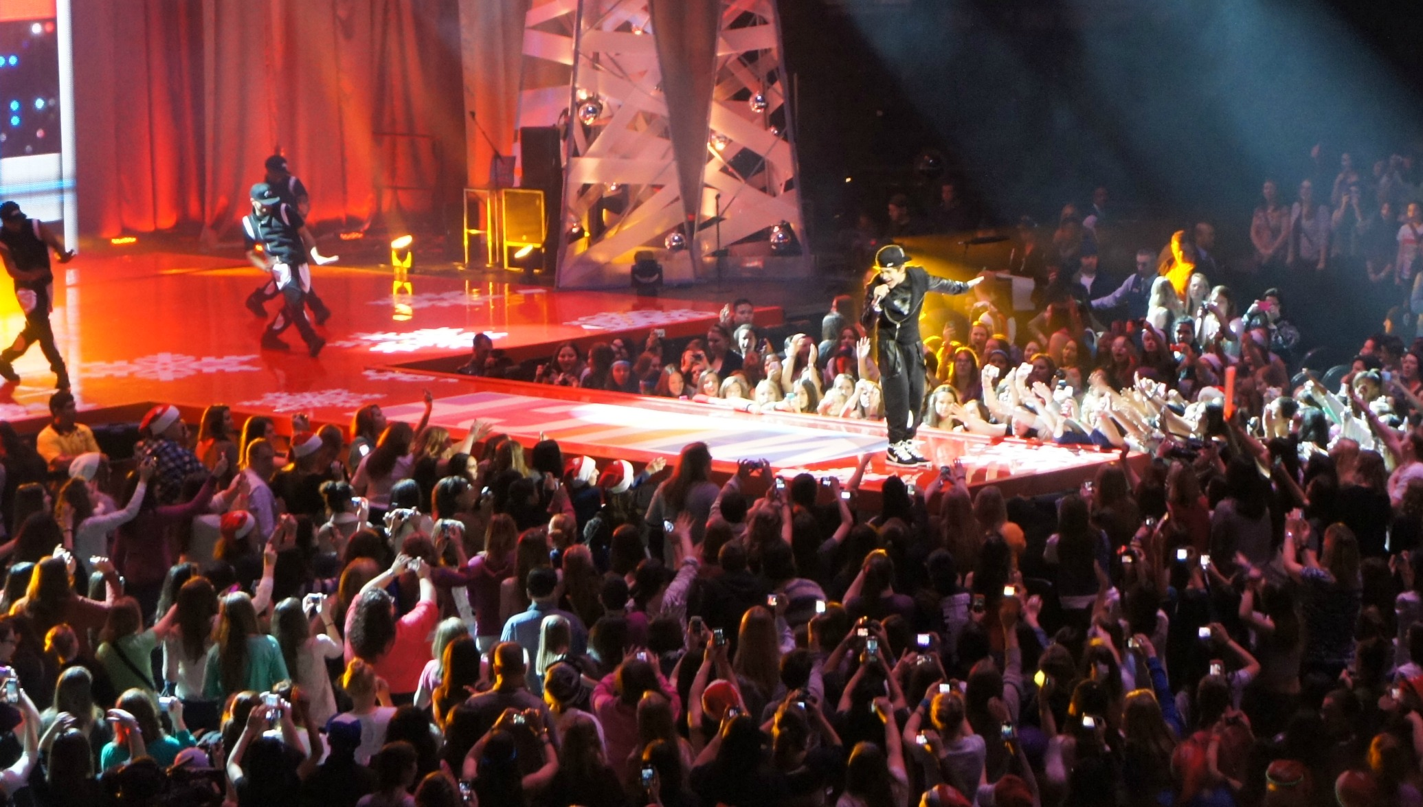 Austin Mahone on dece,ber 2nd at The big jingle presented by Much Music